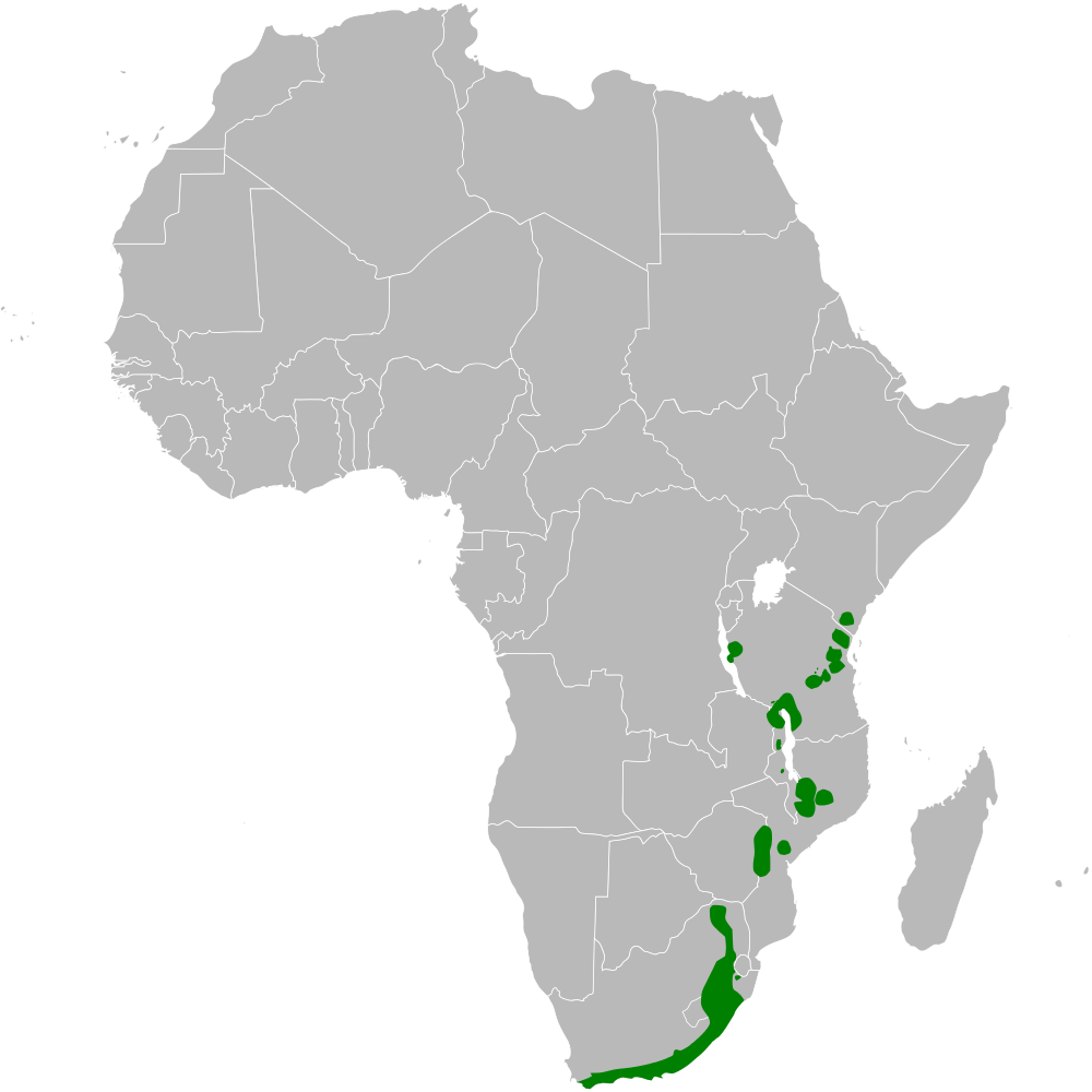 Phylloscopus ruficapilla distribution map, based on